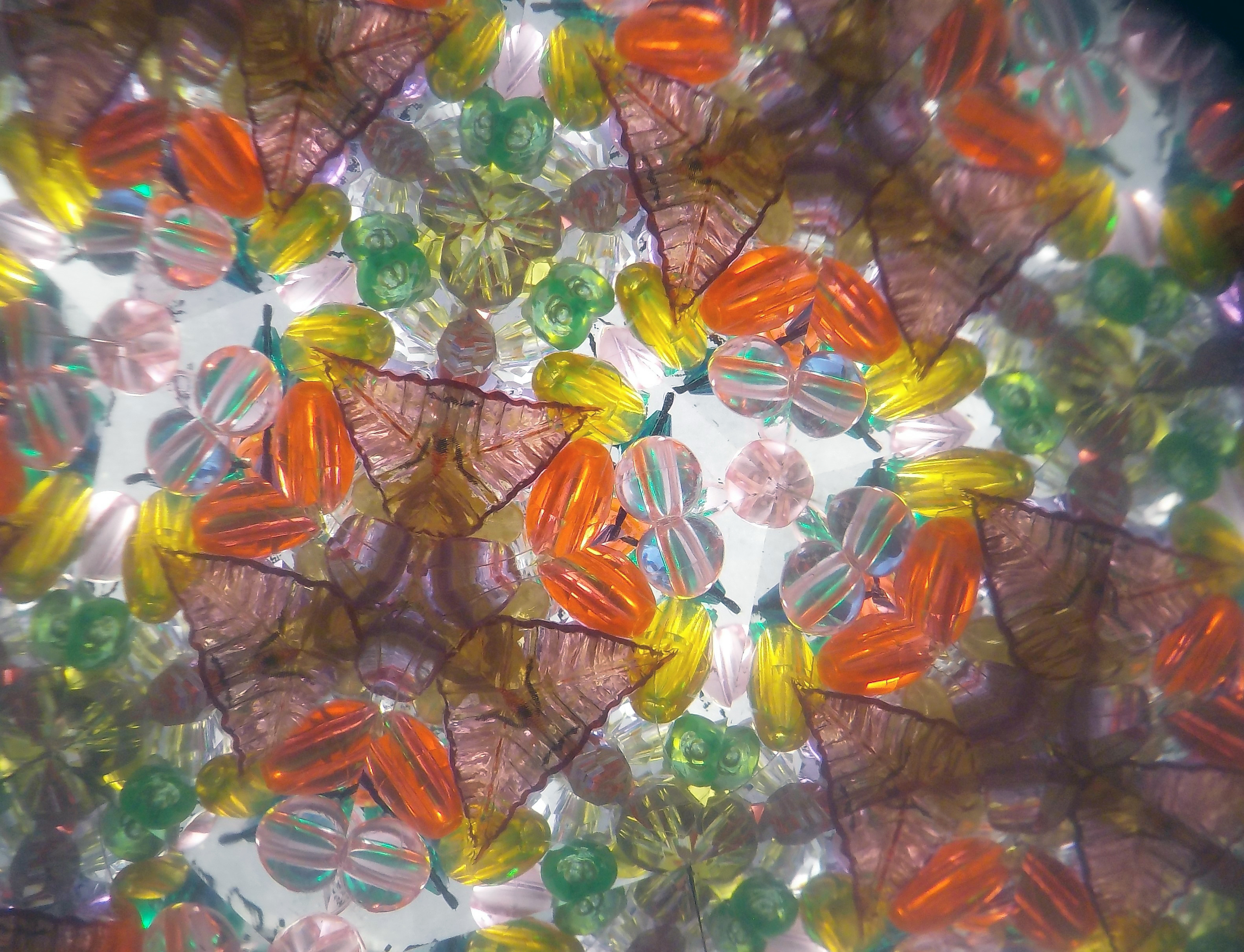 Simmetrie rotazionali nelle figure prodotte con la rotazione di un caleidoscopio